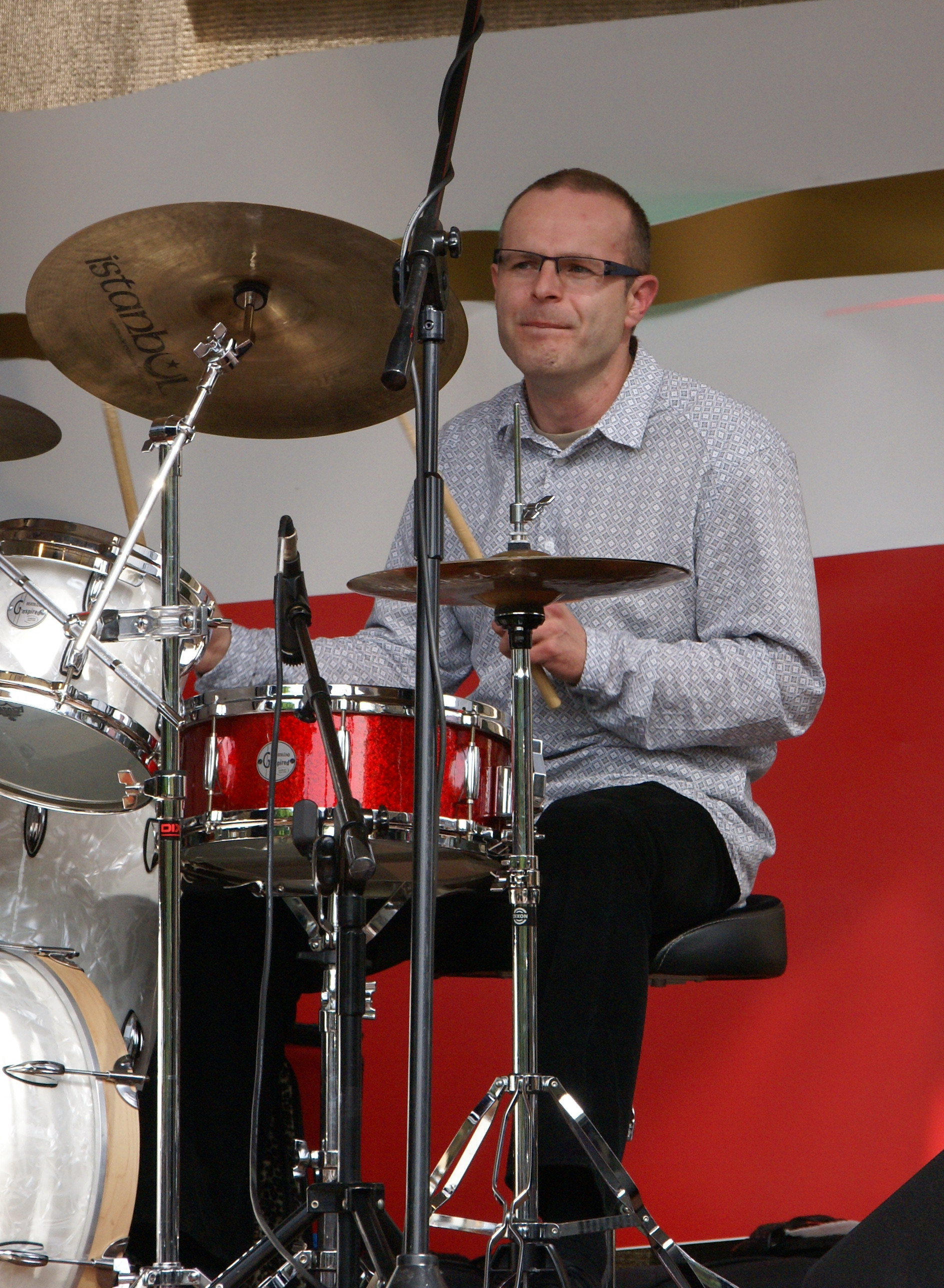 Marcin Jahr podczas koncertu "Kalejdoskop Chopinowski", Bydgoszcz 29.05.2010